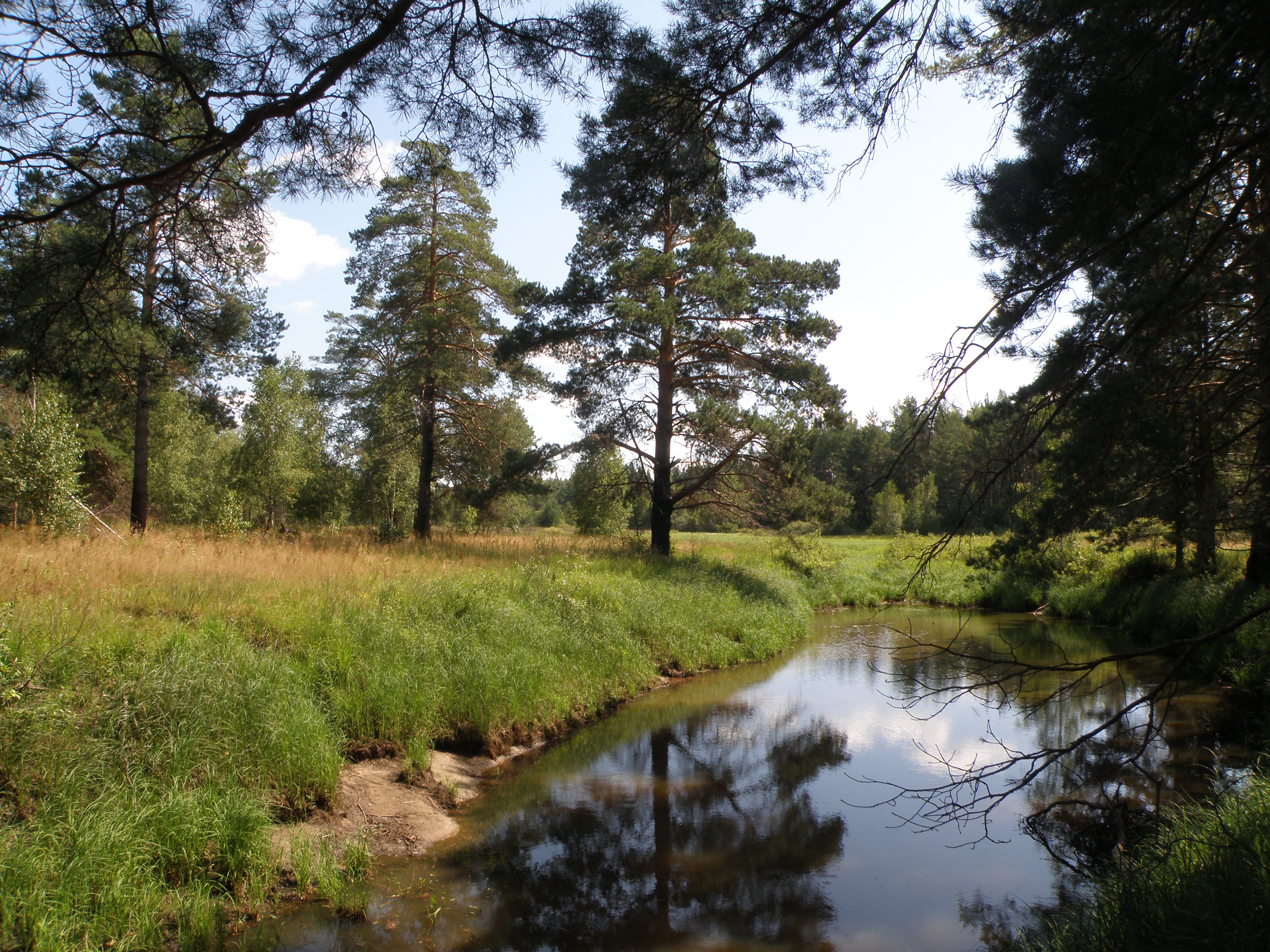 Бужа у Тихоново в начале августа